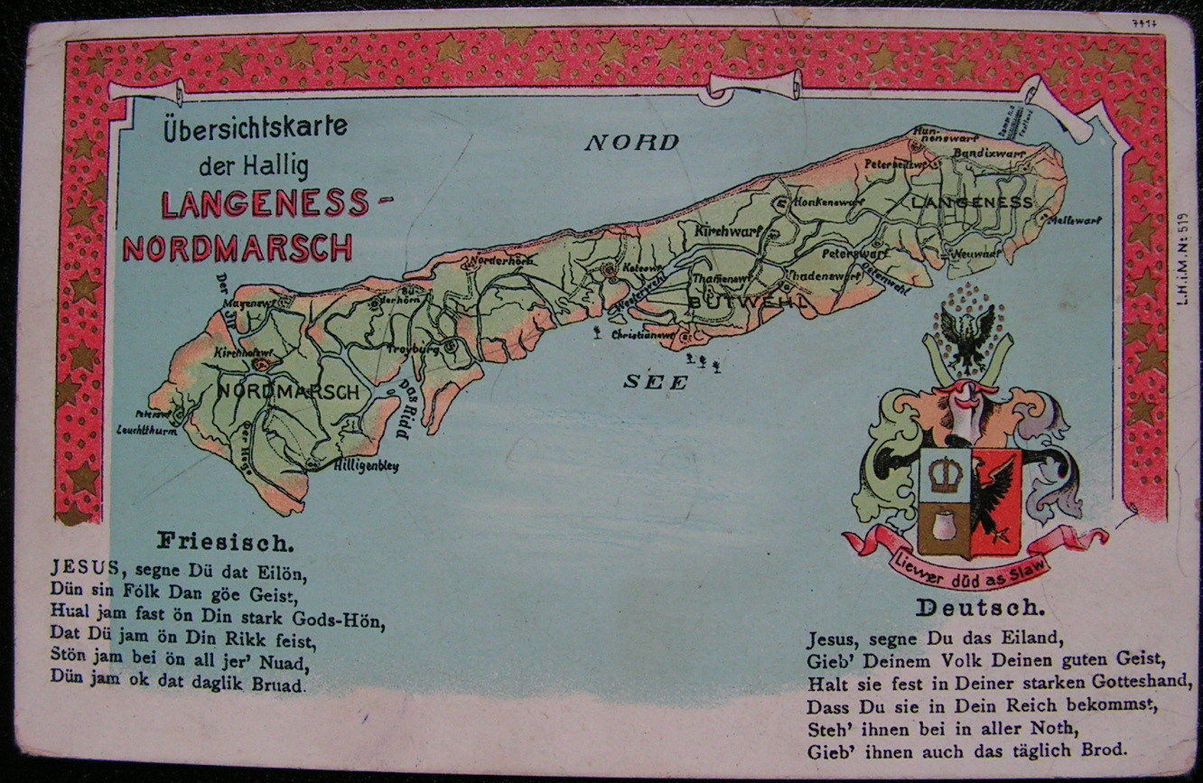 Alte Postkarte mit Karte der Halligen Langeneß, Nordmarsch, Butwehl